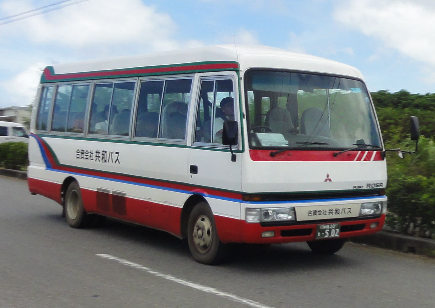 共和バス